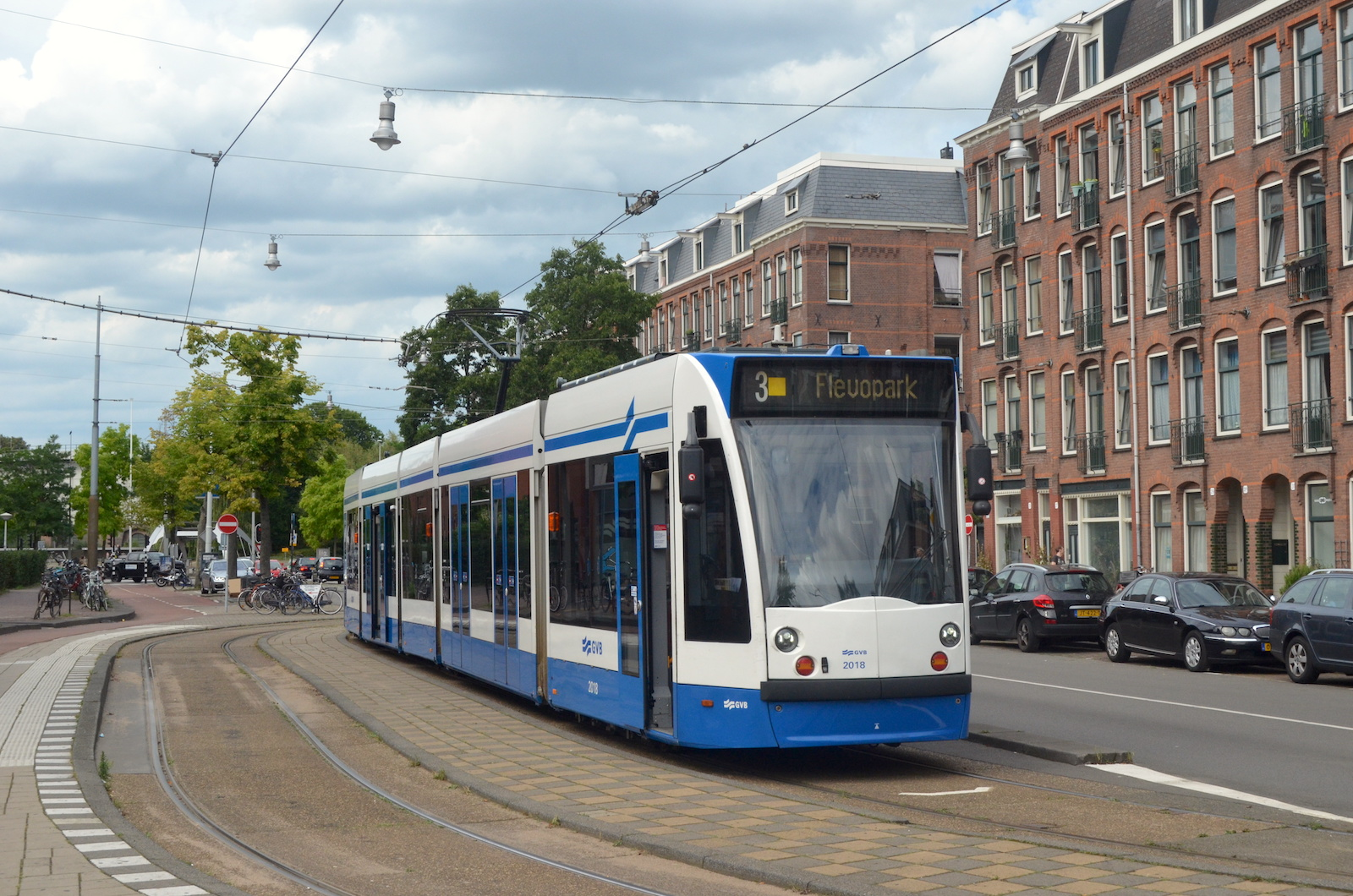 GVB lijn 3 in de Van Hallstraat